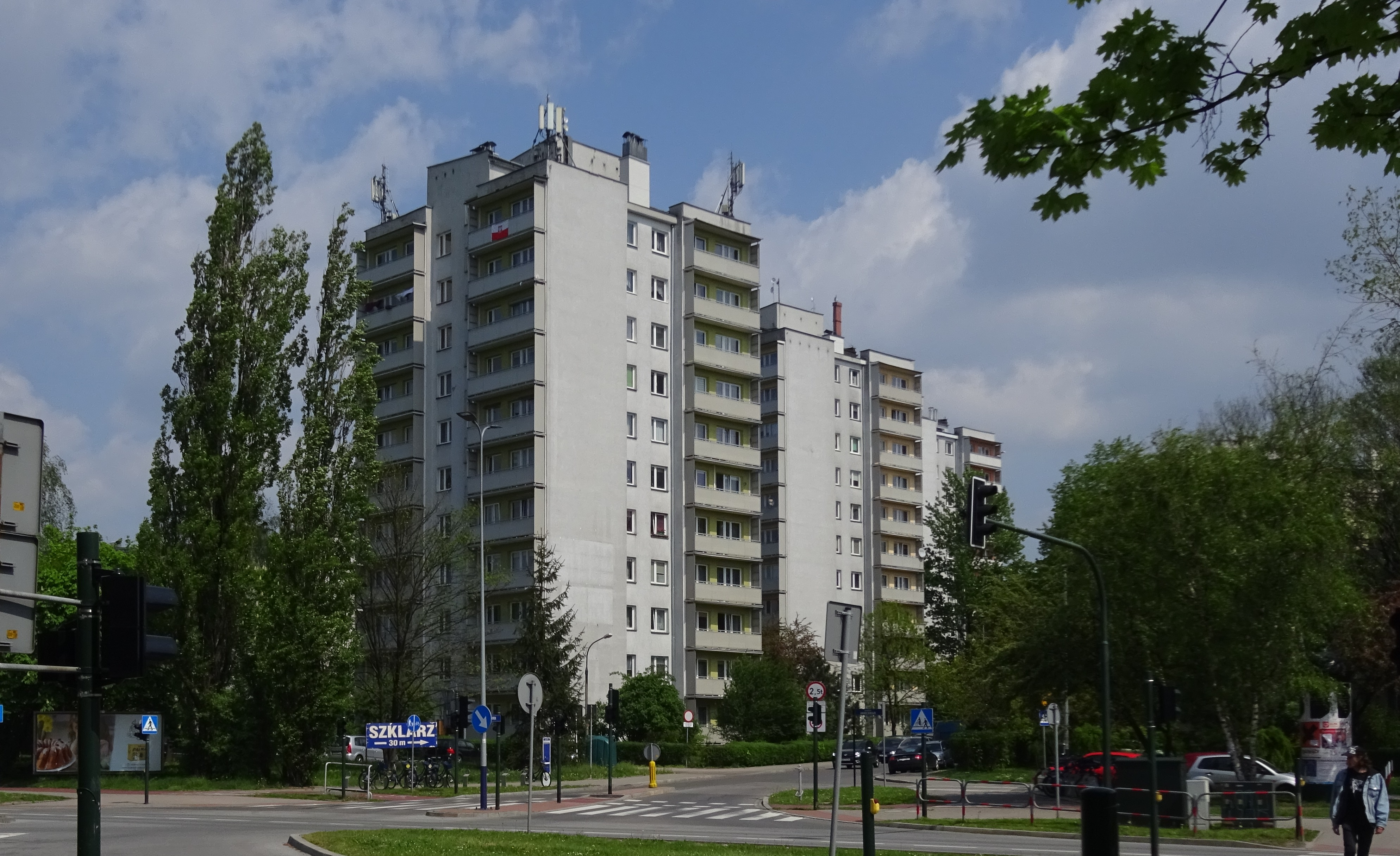 Ugorek - widok wieżowców na osiedlu od południowego zachodu, od strony ul. Meissnera. Kraków, 2019.